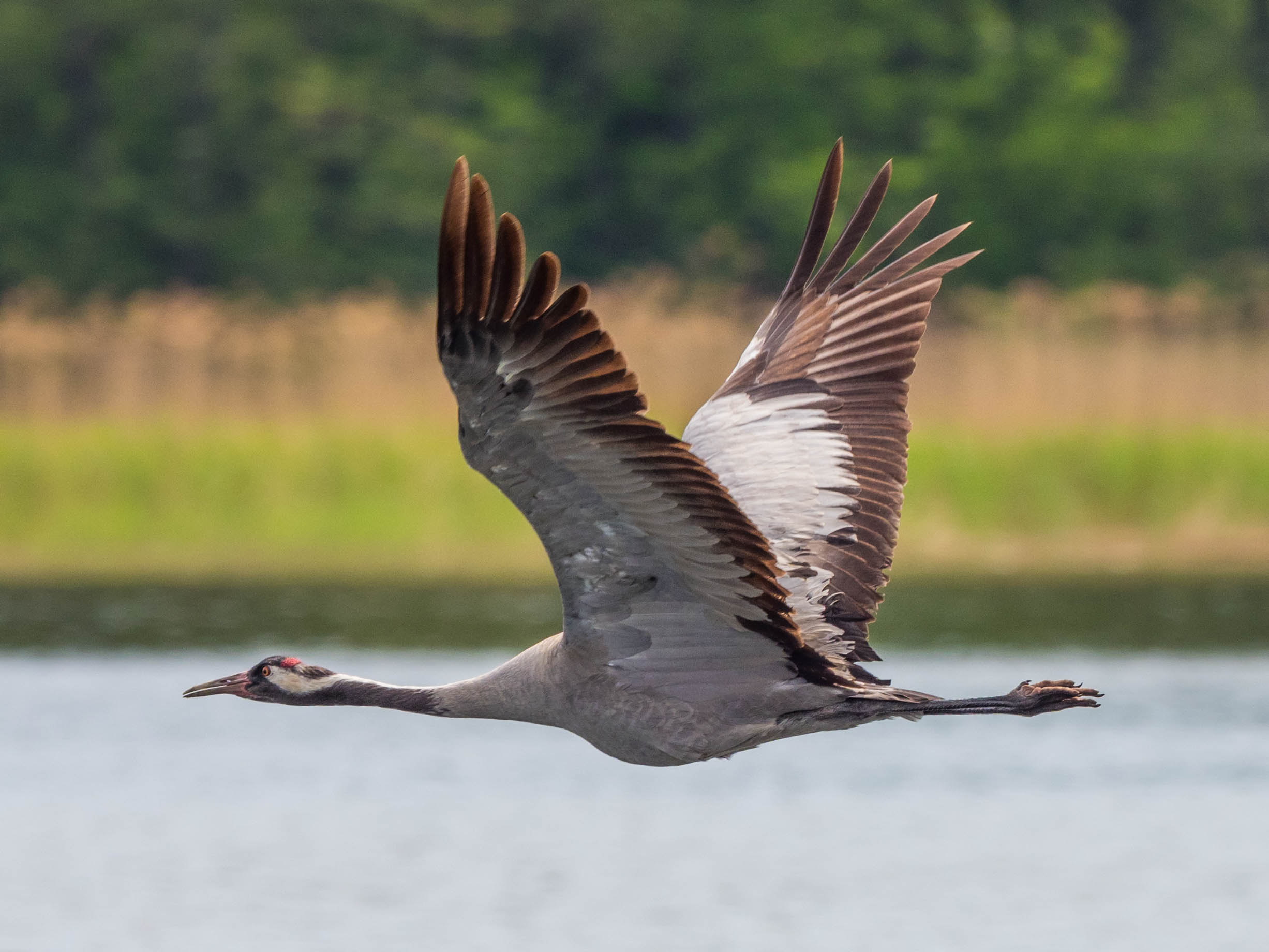 Grus grus